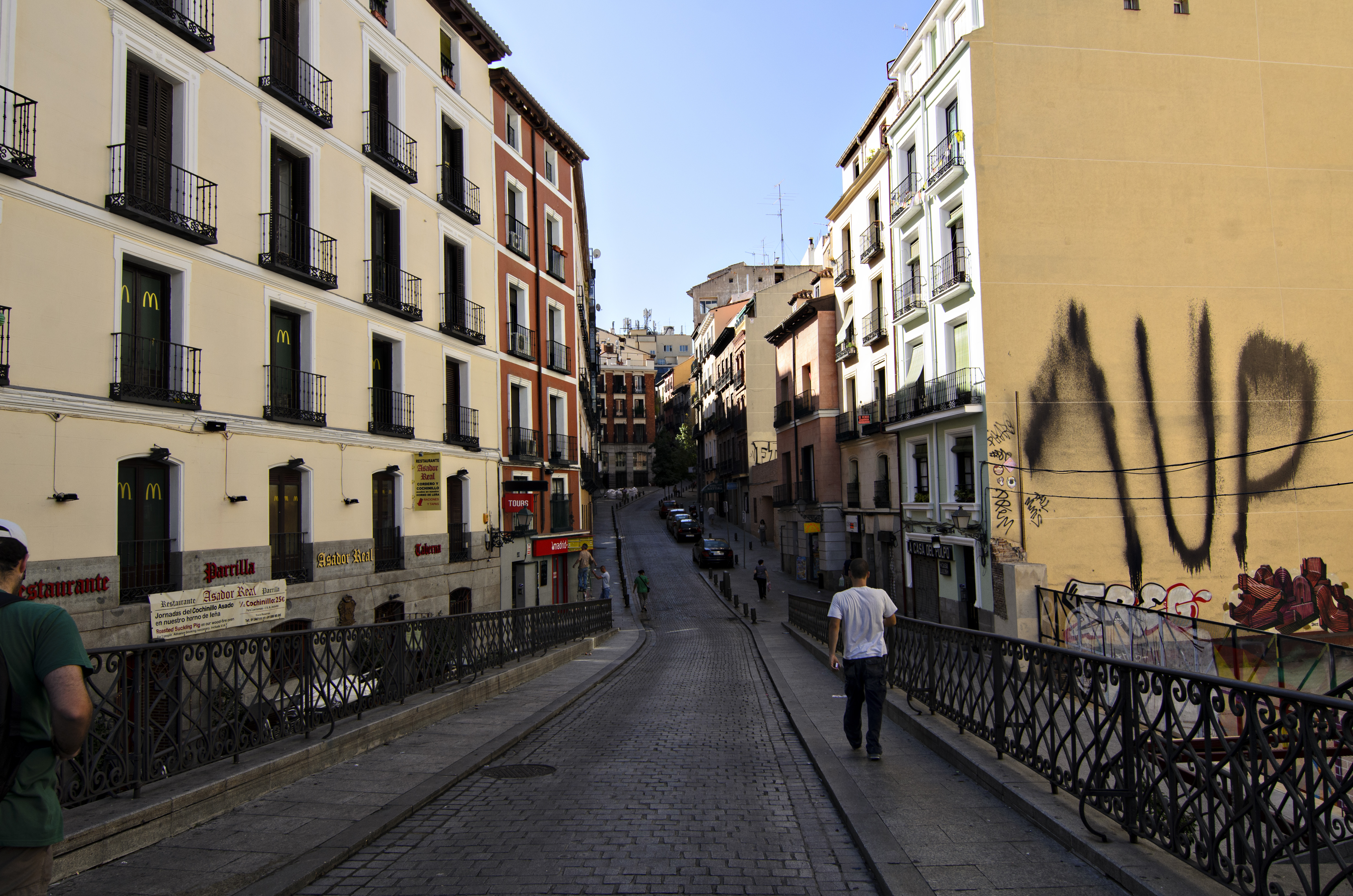 Madrid